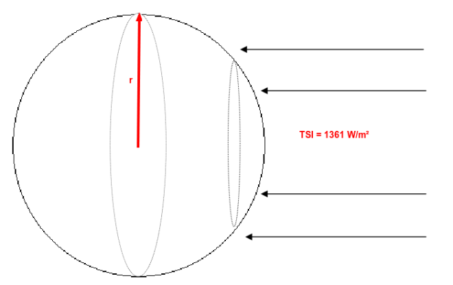 Irradiancia solar promedio en lo alto de la atmósfera